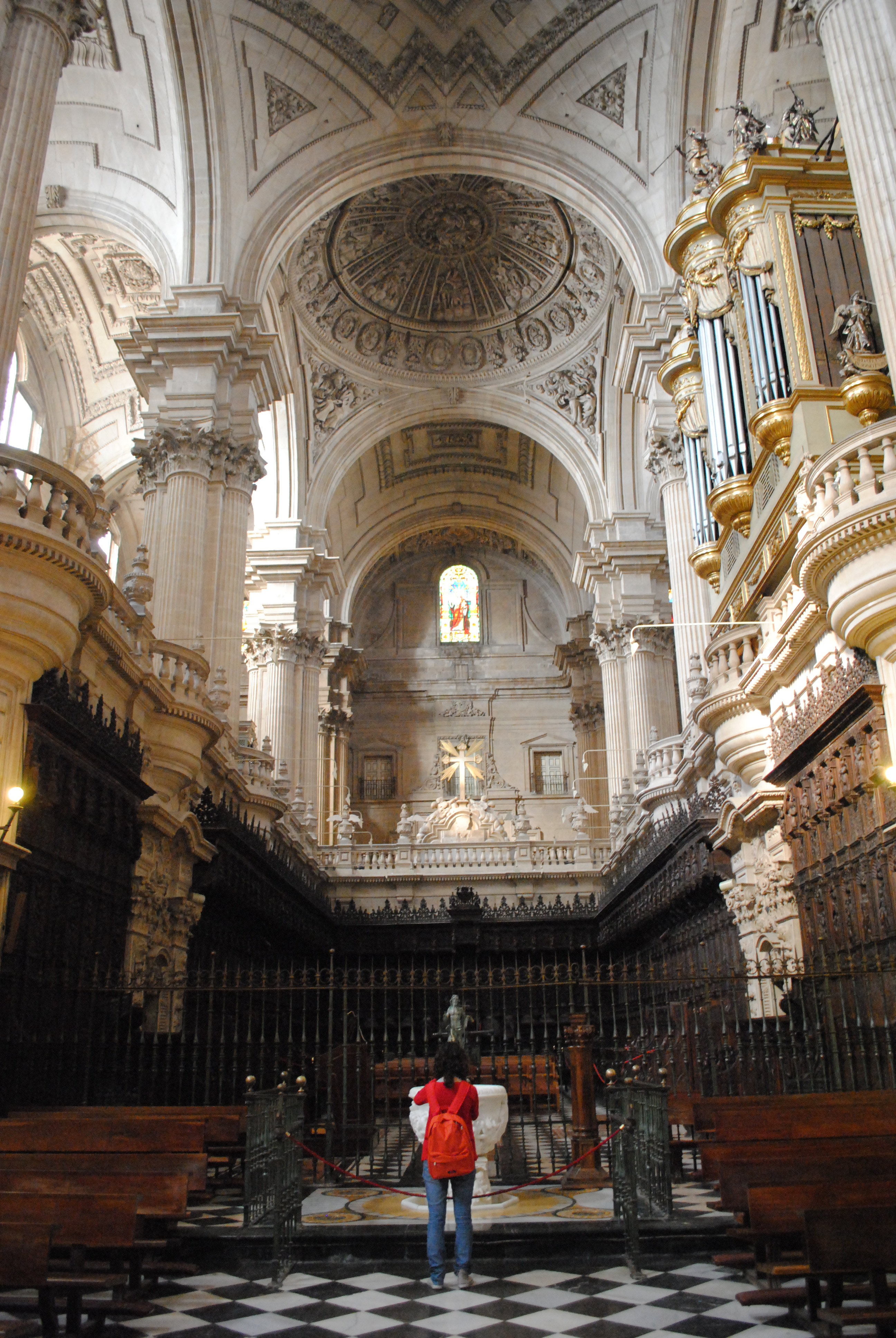 Vista del coro de la Catedral de Jaén.